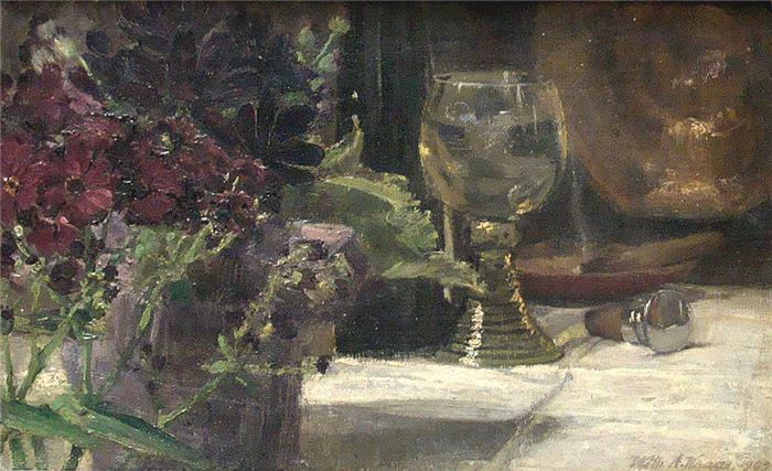 Stillleben mit Weinglas. Öl auf Leinwand, signiert und datiert 1905, 24,5 x 39,5 cm